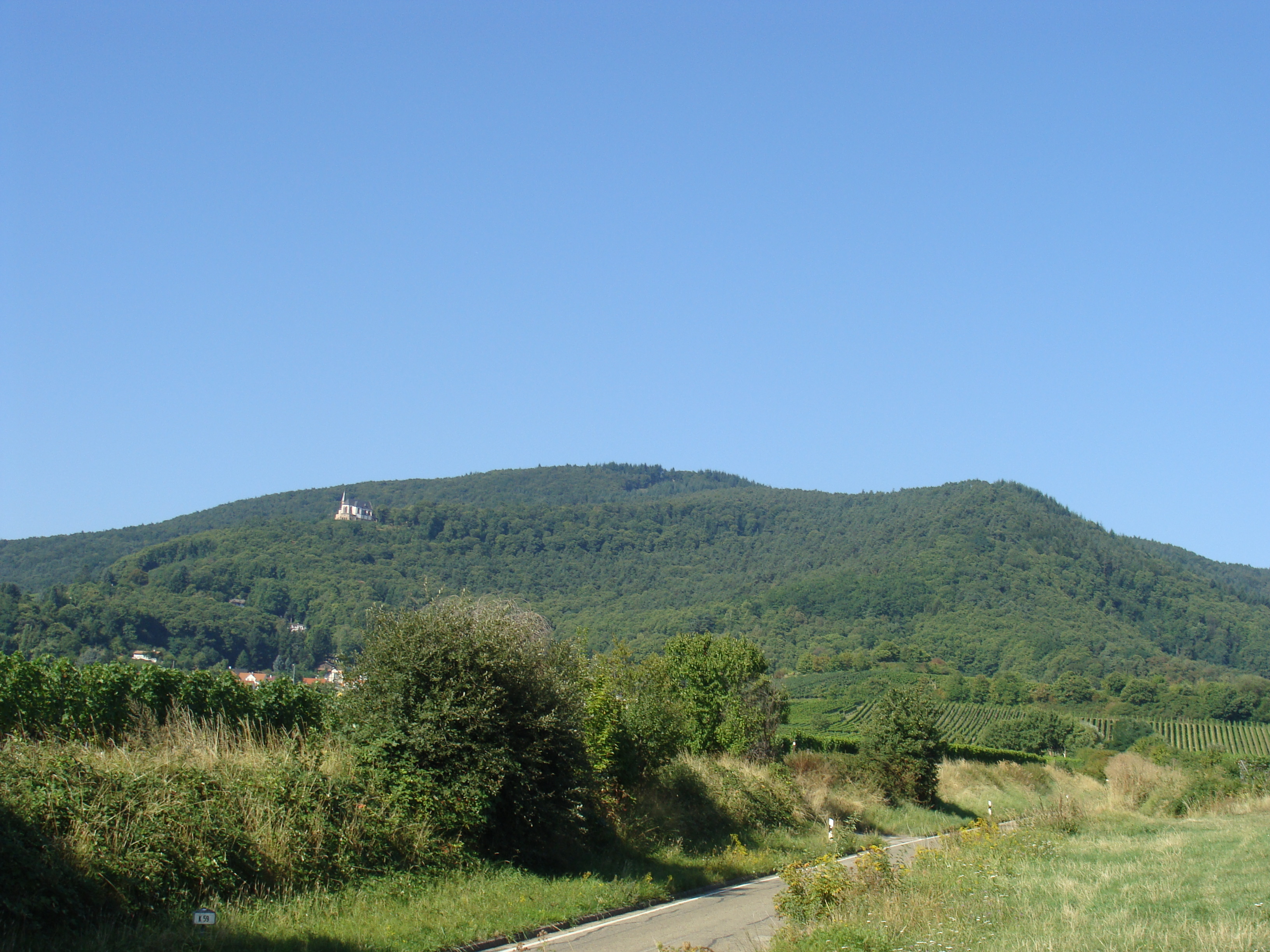 Teufelsberg mit Lambertskopf und Annaberg